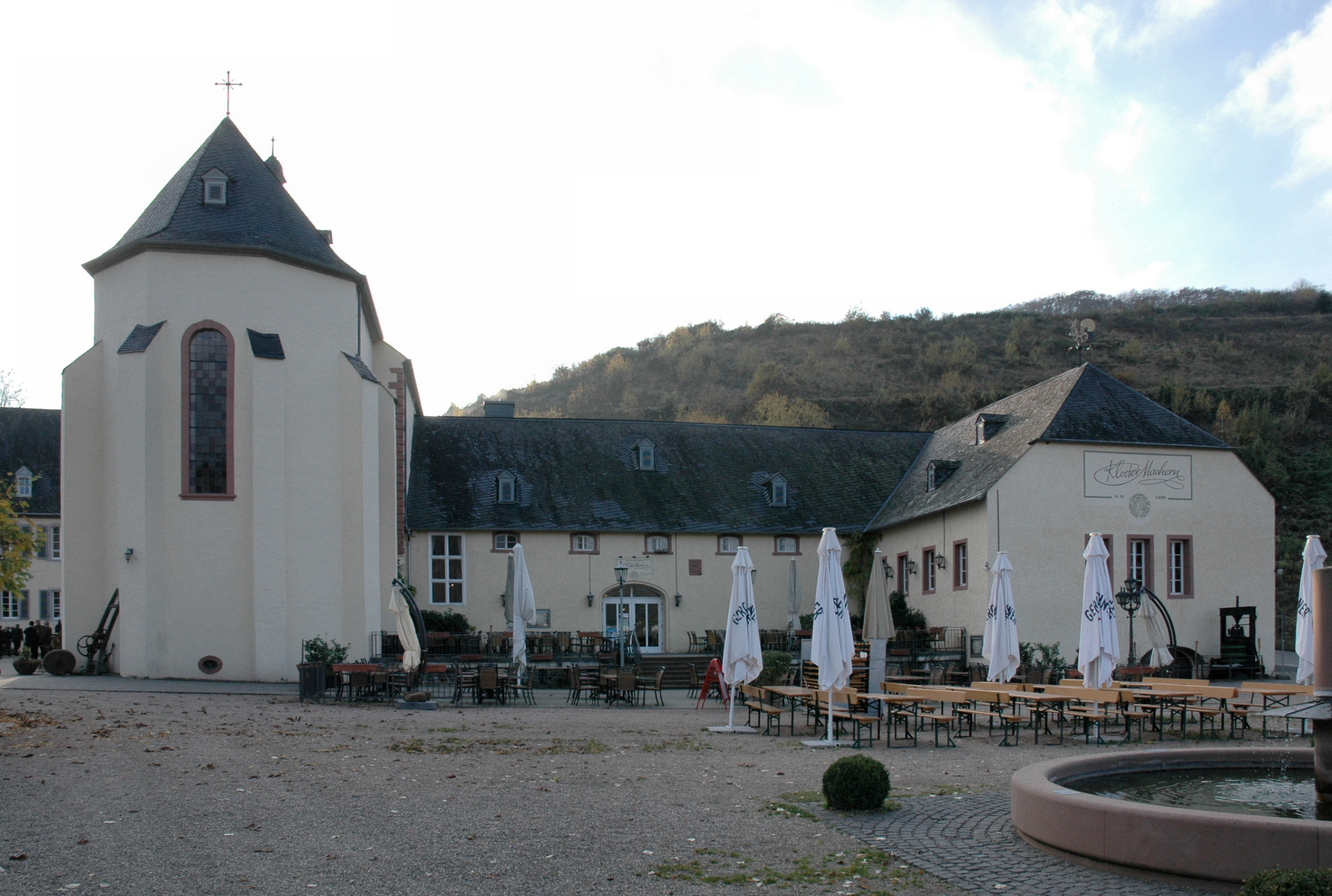 Kloster Machern in Bernkastel-Kues